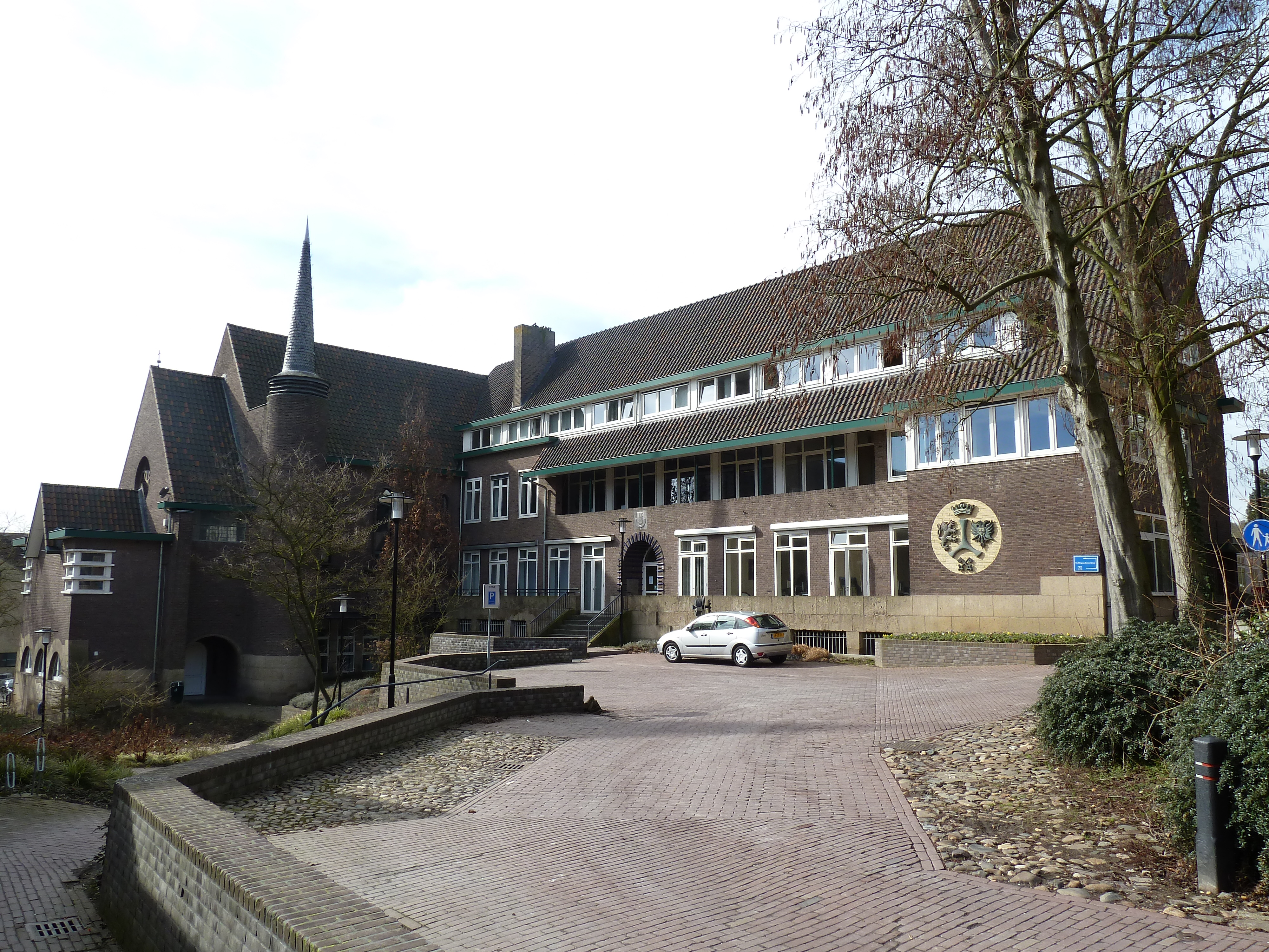 Gemeentehuis Gulpen Wittem, Gulpen, Limburg, Nederland